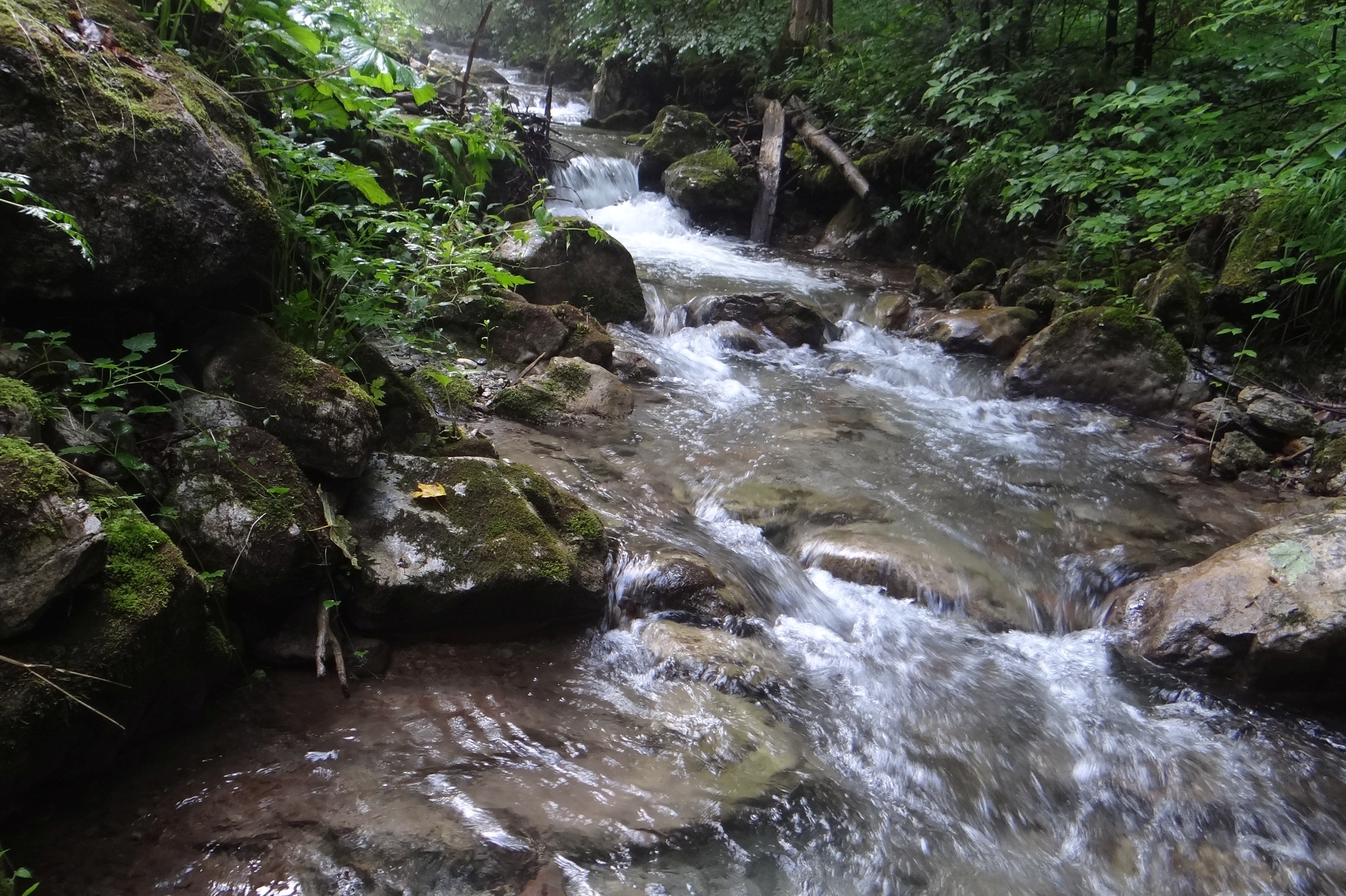 Bystrica (prítok Hrona) w Dolnym Harmanecu